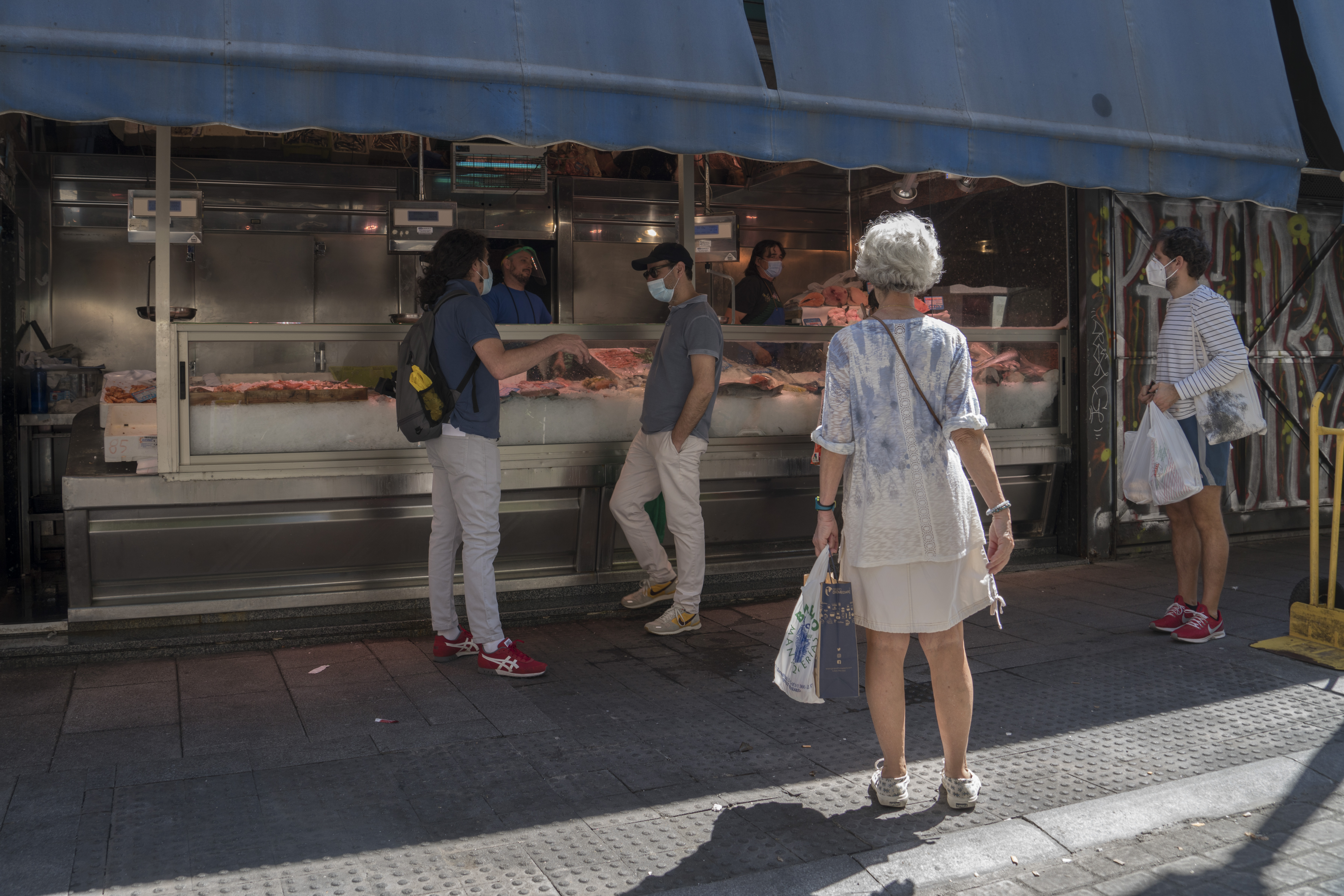 Mercado de San Antón. Madrid. 20 de mayo de 2020